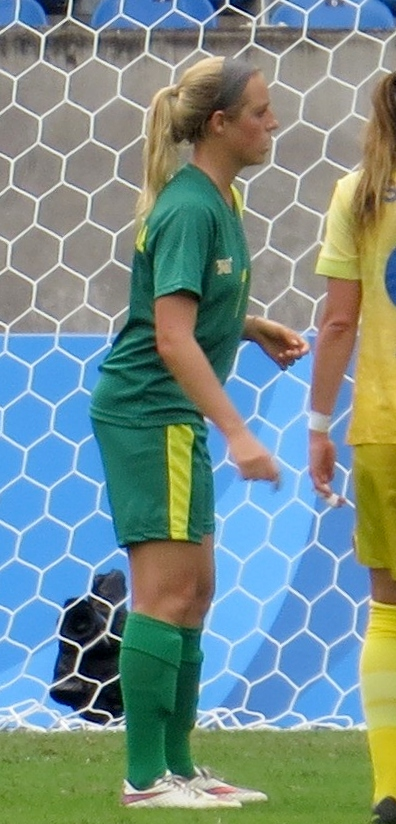 Futebol feminino Suécia 1 x0 Africa do Sul 03/08/16